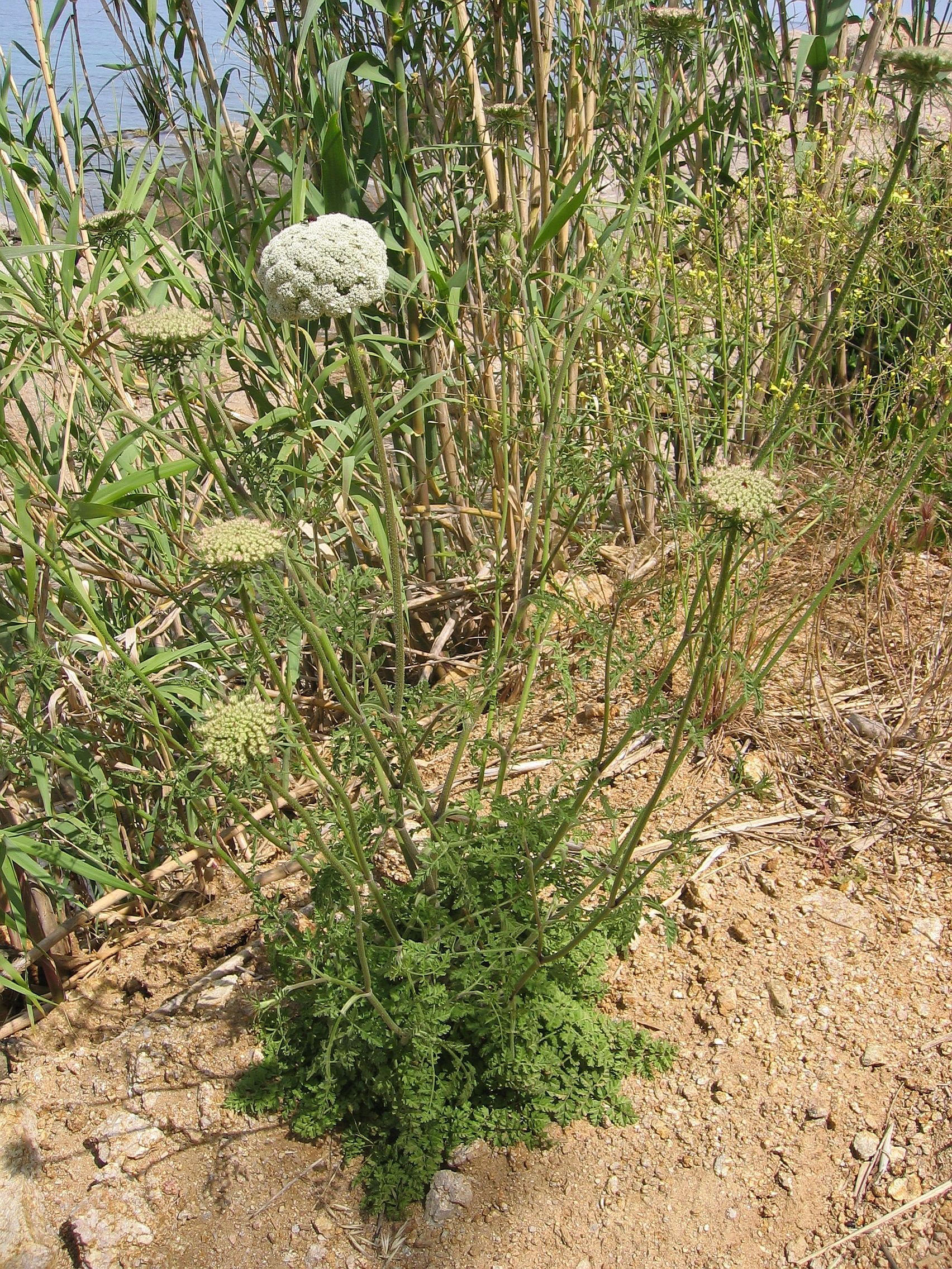 Daucus carota (probably subsp. commutatus) Calvi, Corse, France